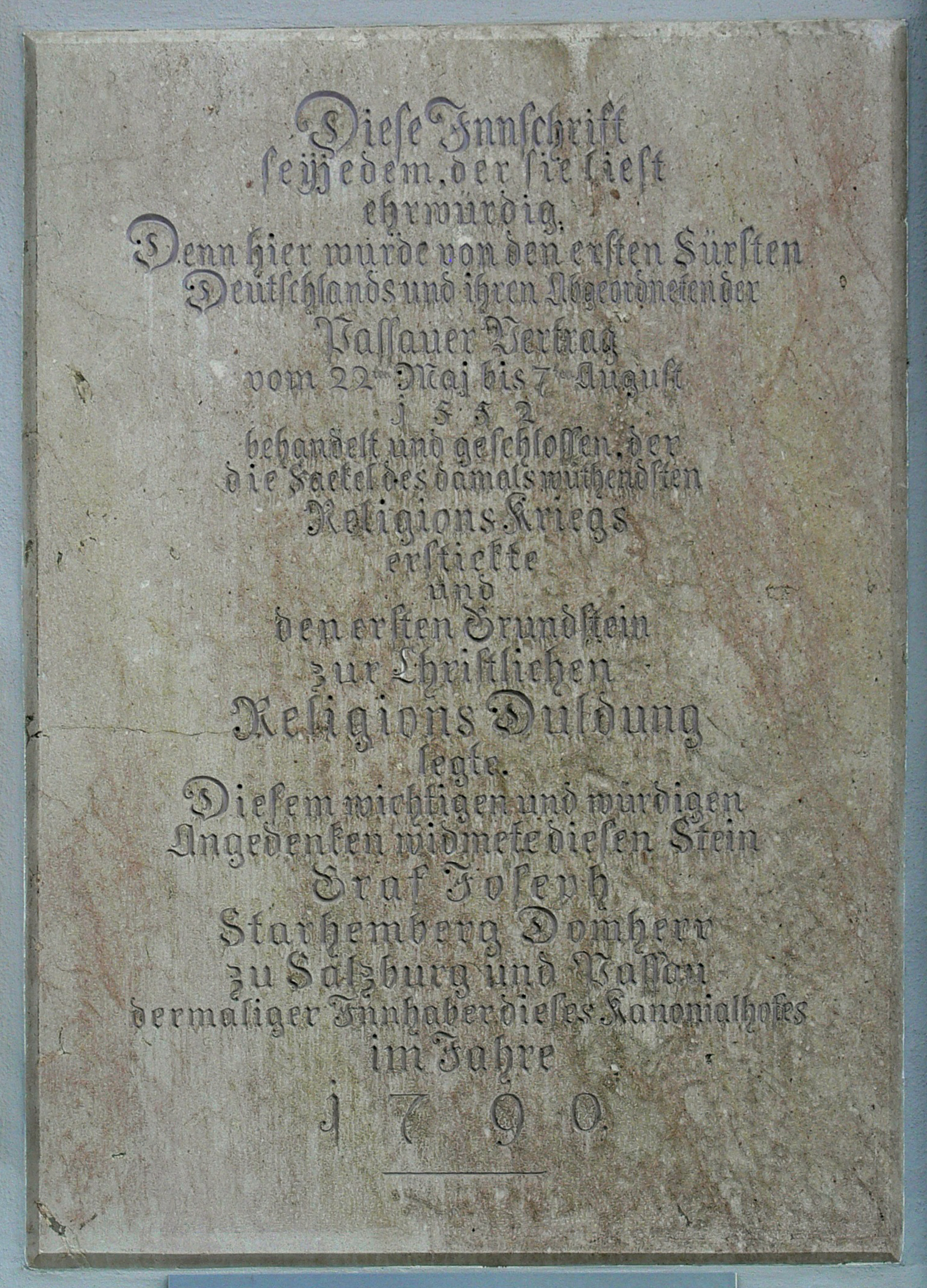 Passau, Domplatz, Lamberg-Palais, Gedenktafel an den dort geschlossenen Passauer Vertrag von 1552, Gedenktafel gestiftet 1790 von Domherr Graf Joseph Starhemberg Diese Inschrift sei jedem, der sie liest ehrwürdig. Denn hier wurde von den ersten Fürsten Deutschlands und ihren Abgeordneten der Passauer Vertrag vom 22ten Mai bis 7ten August 1552 verhandelt und geschlossen, der die Fackel des damals wüthenden Religions-Kriegs erstickte und den ersten Grundstein zur Christlichen Religions Duldung legte. Diesem wichtigen und würdigen Angedenken widmete diesen Stein Graf Joseph Starhemberg Domherr zu Salzburg und Passau dermaliger Inhaber dieses Kanonikatshofes im Jahre 1790.